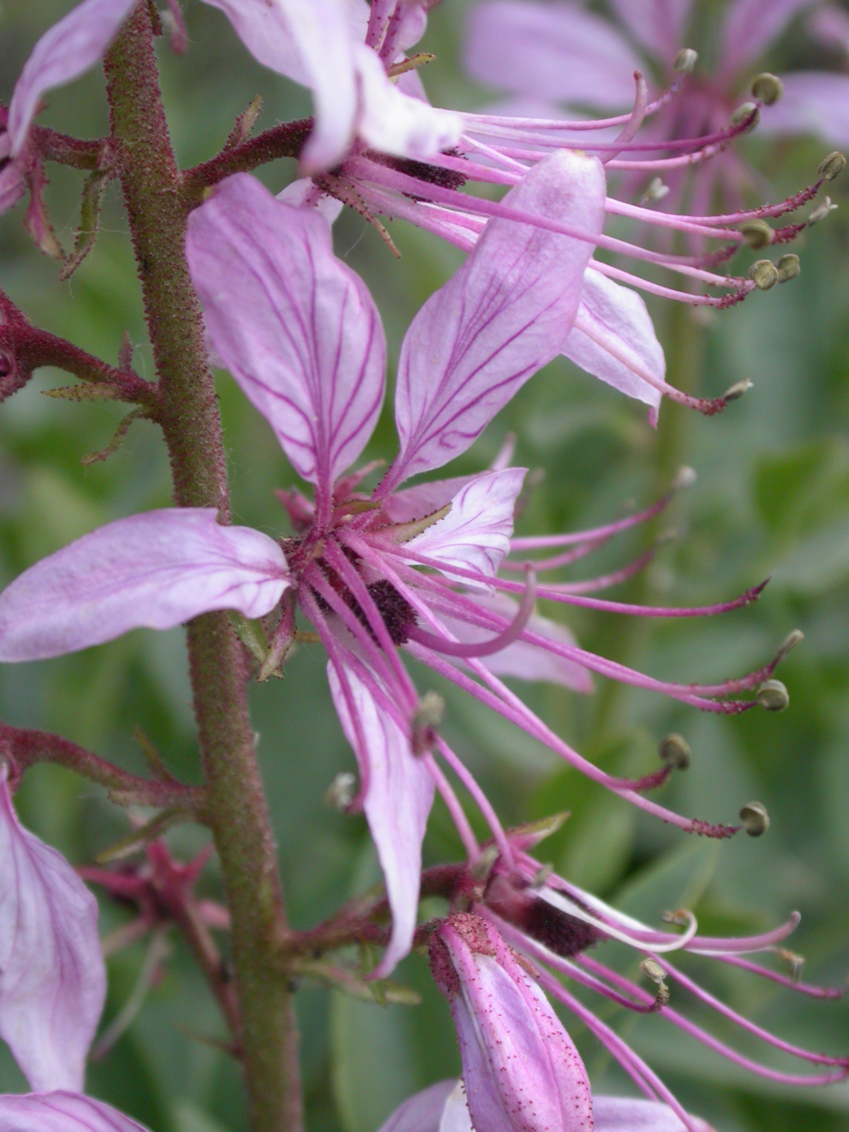 Tarraguillo